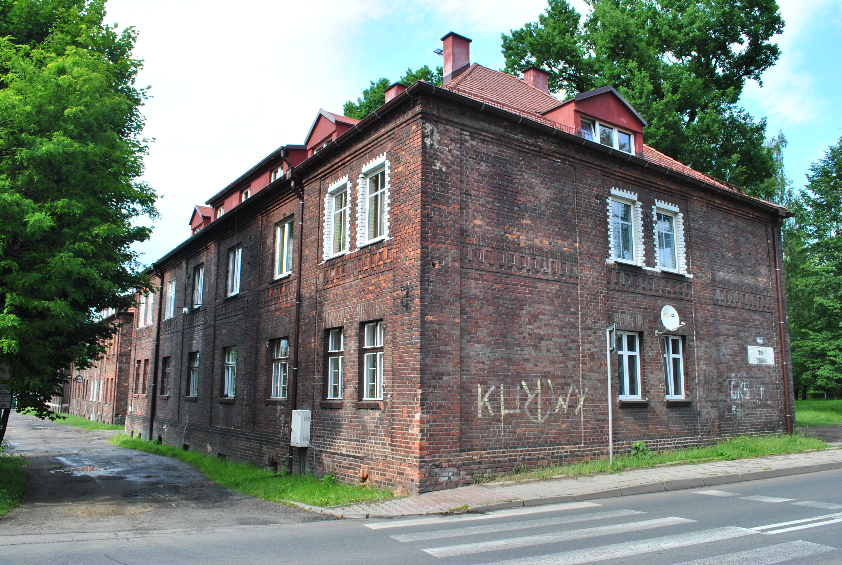 Katowice - Obroki. Budynki mieszkalne z początku XX wieku położone przy ul. Obroki